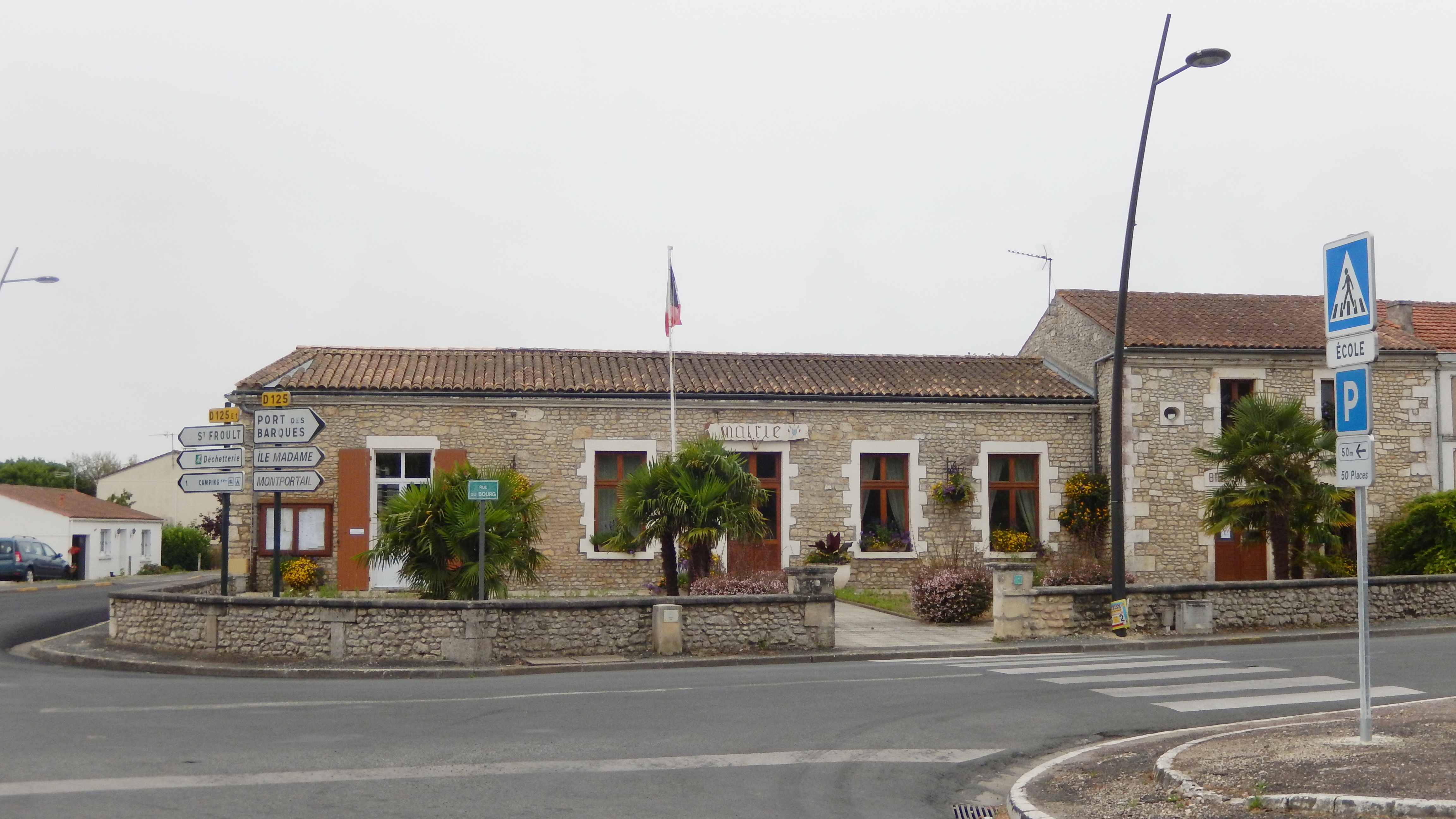 La mairie de Saint-Nazaire-sur-Charente, une commune française du département de la Charente-Maritime.